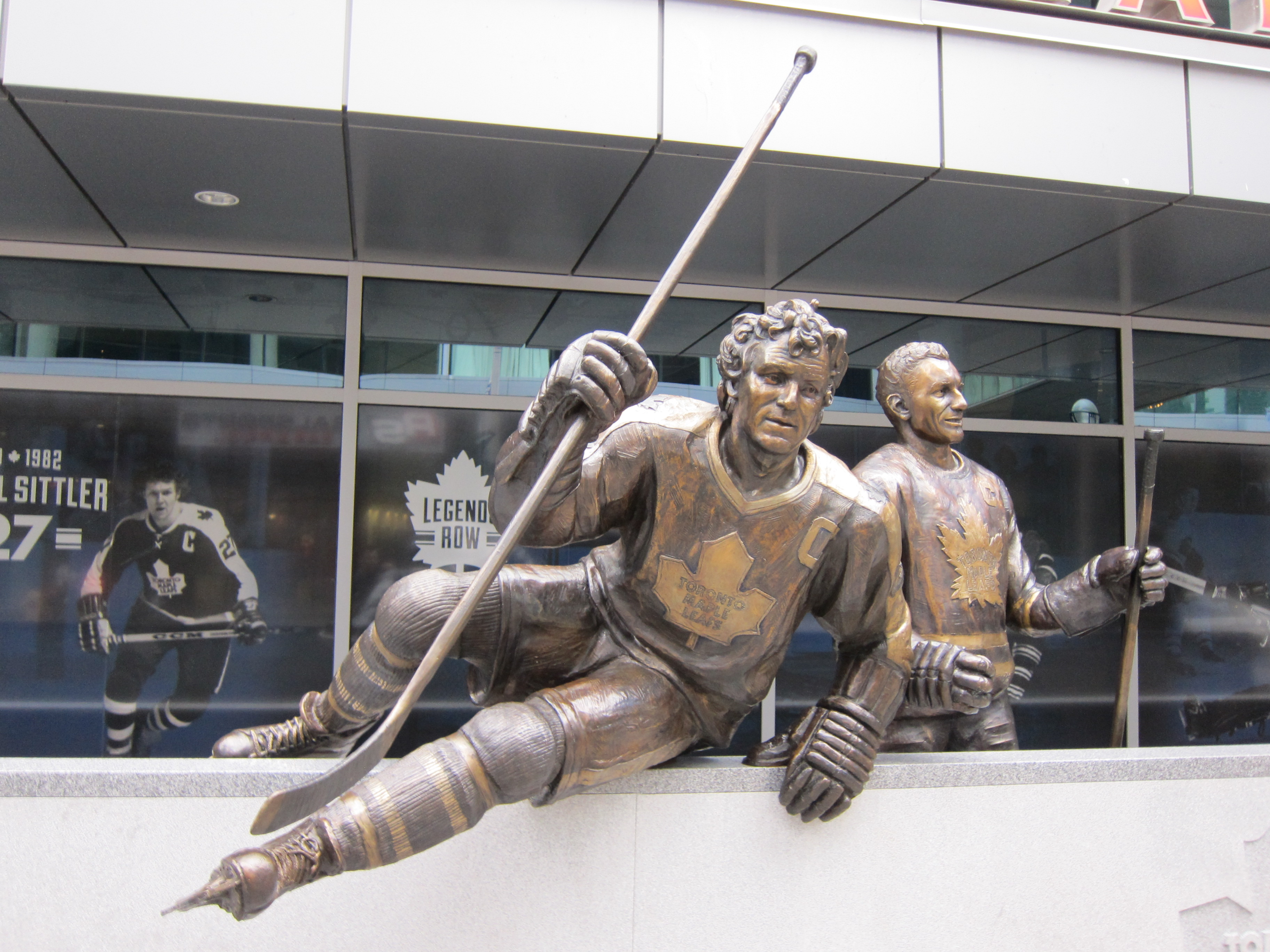 At Toronto, Ontario